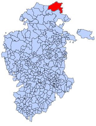 Situación de Valle de Mena en la provincia de Burgos (España)